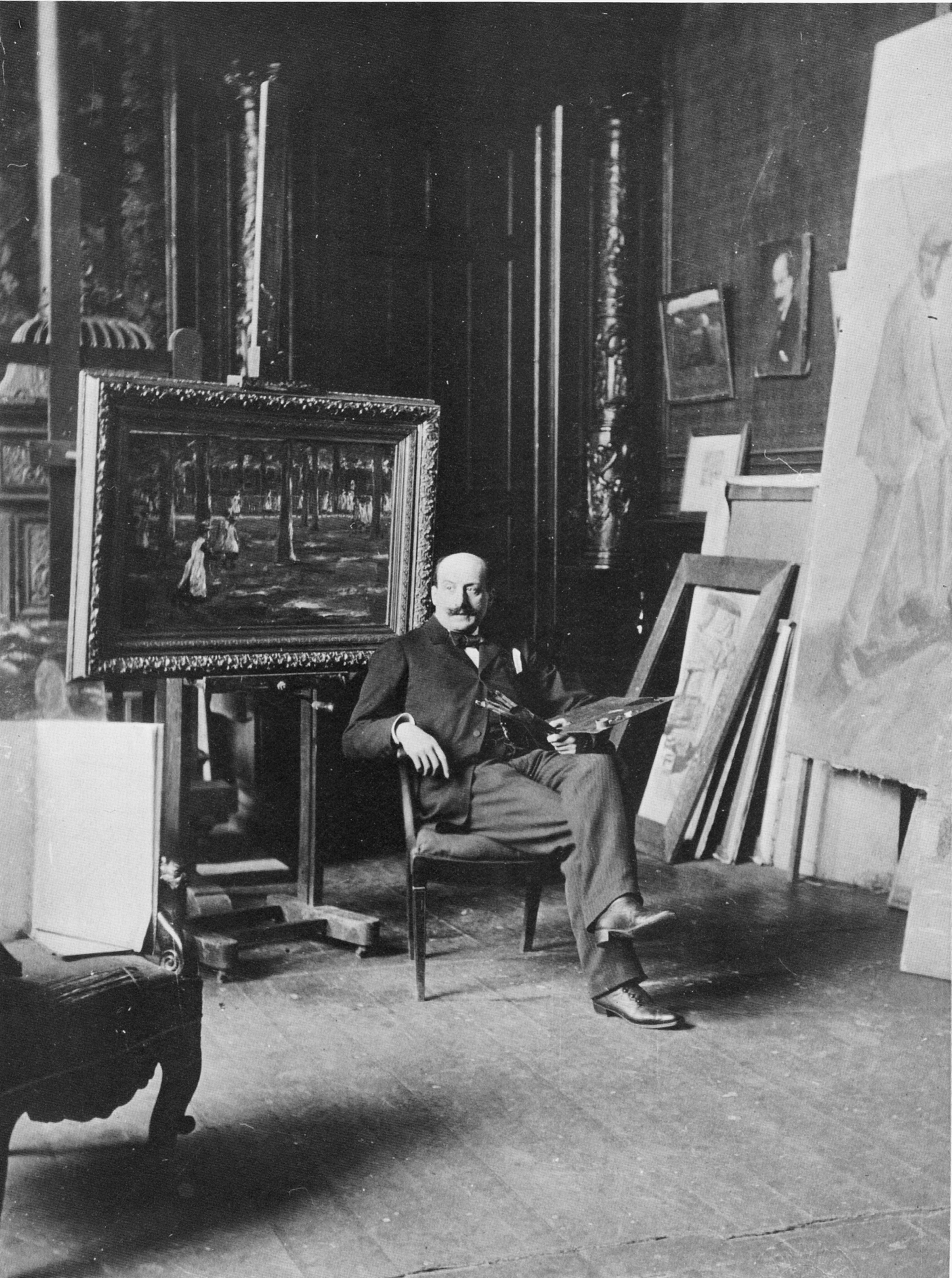 Max Liebermann in seinem Atelier in der Auguste-Viktoria-Straße (Berlin) vor seinem Gemälde „Schulgang in Laren“.